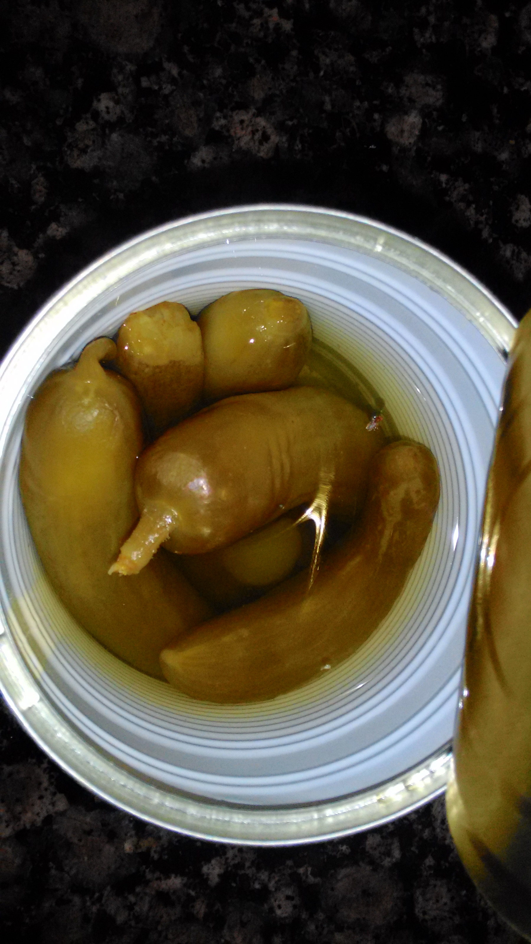 מלפפון חמוץ בקופסת שימורים